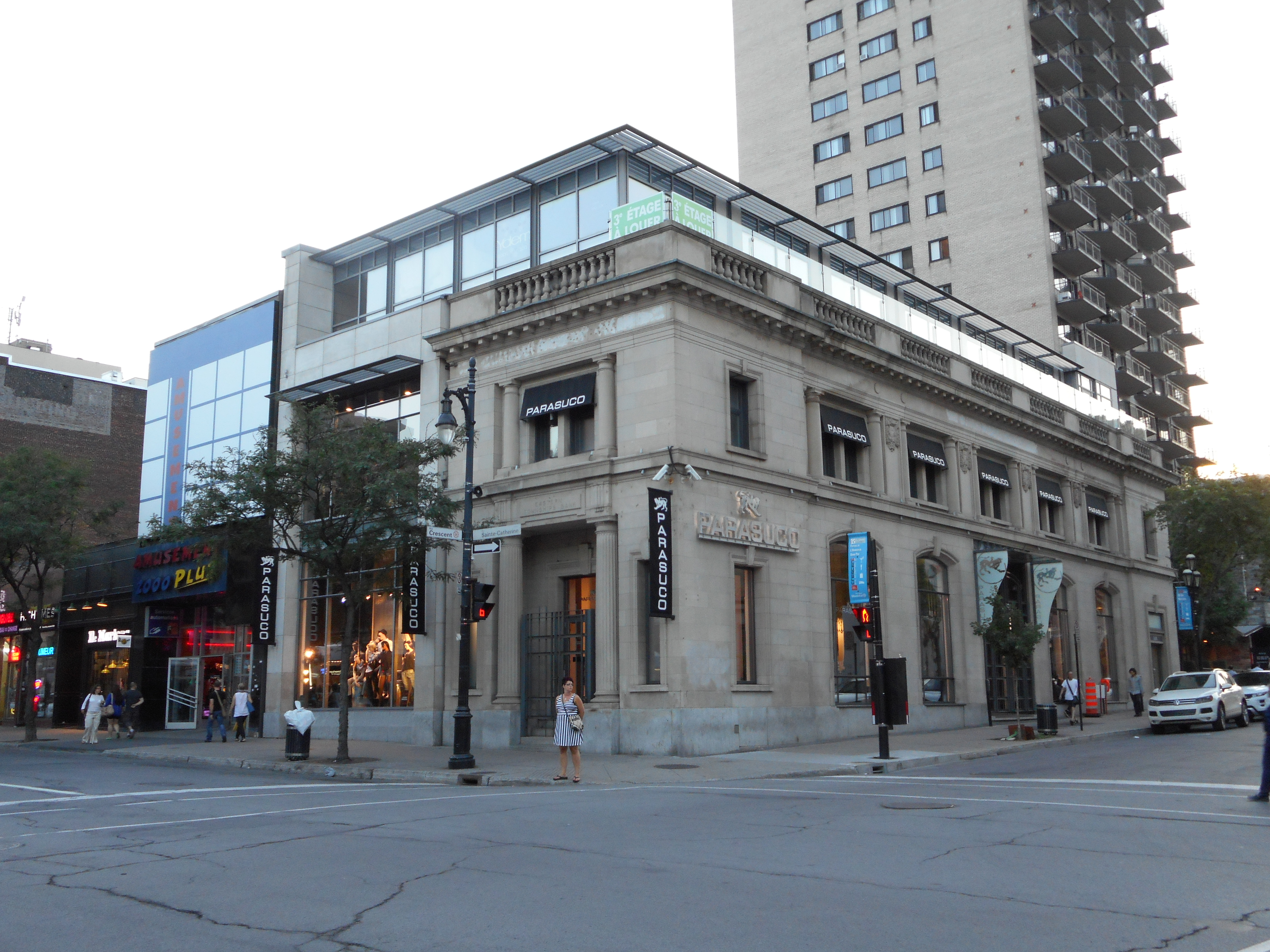 Magasin-phare de Parasuco, au 1414, rue Crescent, Montréal « L’édifice situé au 1371, rue Sainte-Catherine Ouest à l’angle de la rue Crescent, est une ancienne banque, construite en 1910 comme une succursale de la Eastern Townships Bank, selon les plans des architectes Louis-Auguste Amos et Alfred Cox. »